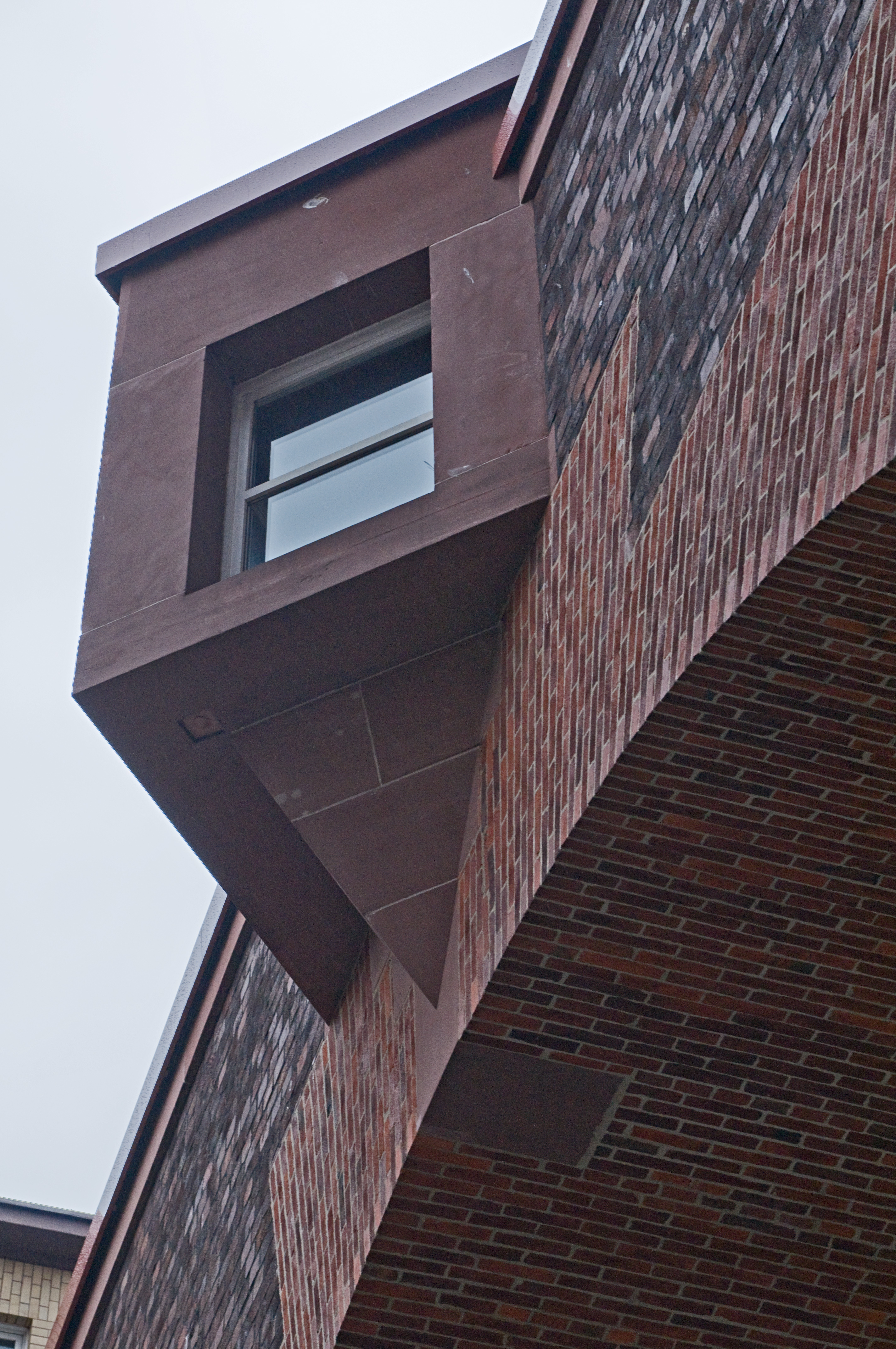 Industriepark HöchstBehrensbau: Erker an der Brücke